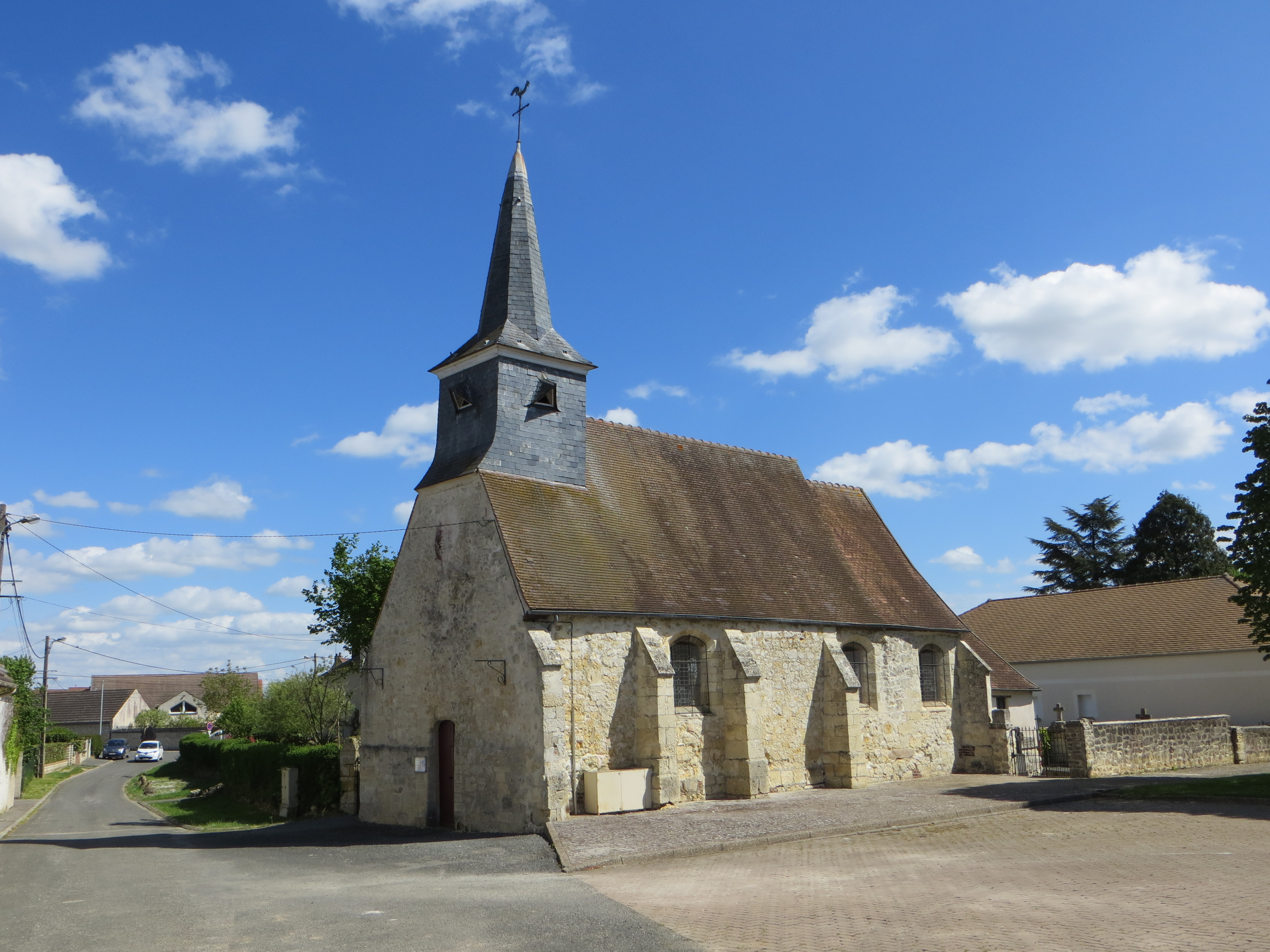 Vue générale de l'église